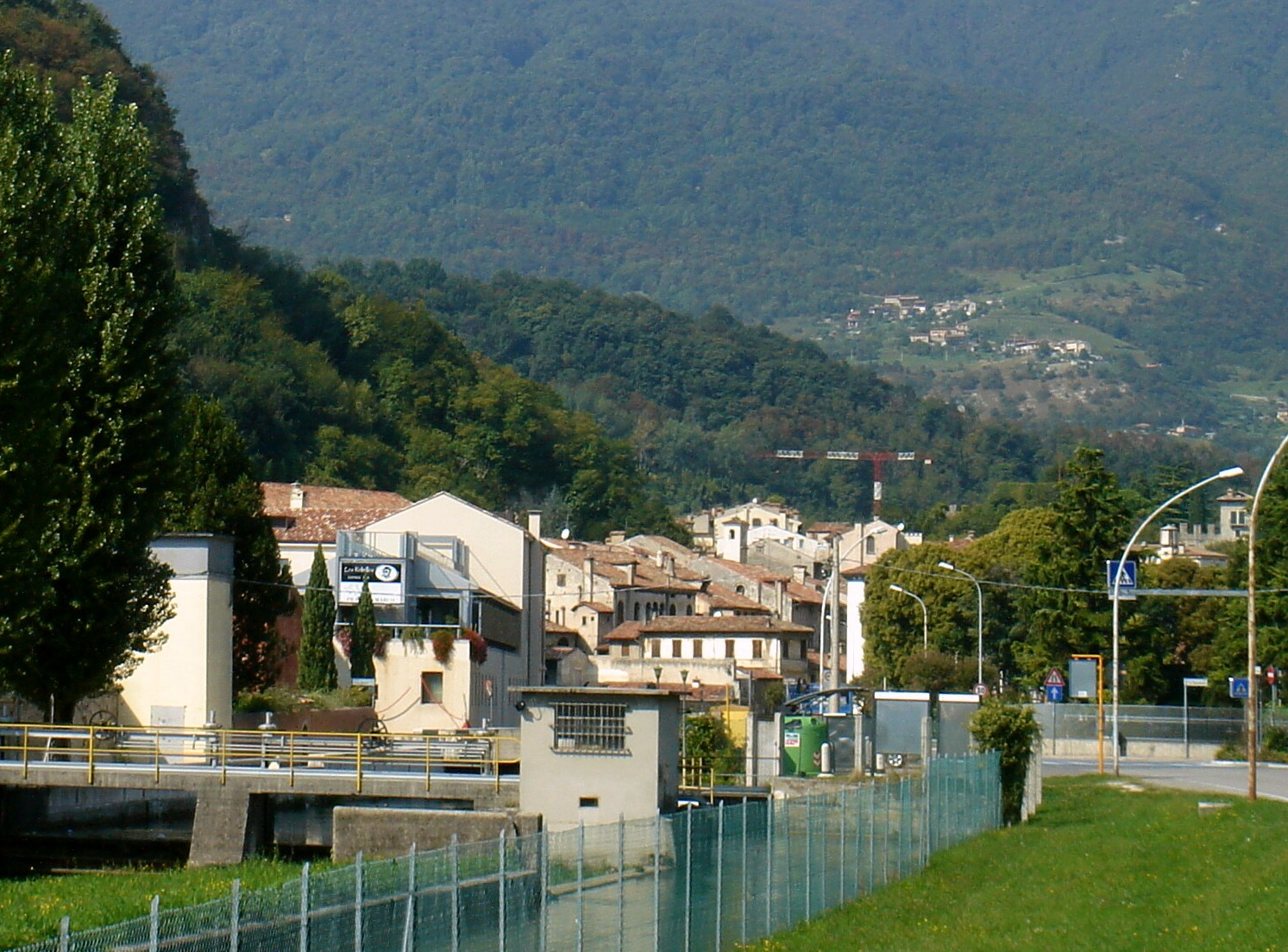 Serravalle di Vittorio Veneto (Treviso): veduta dei palazzi del centro storico da sud.